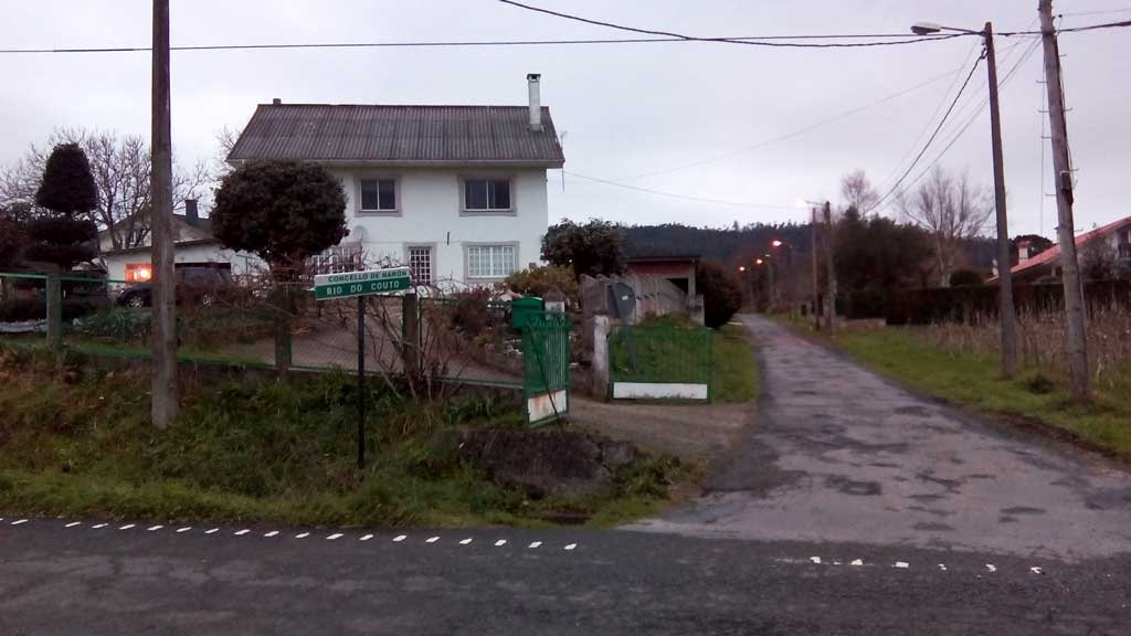 Acceso a Río do Couto, Pedroso, Narón.